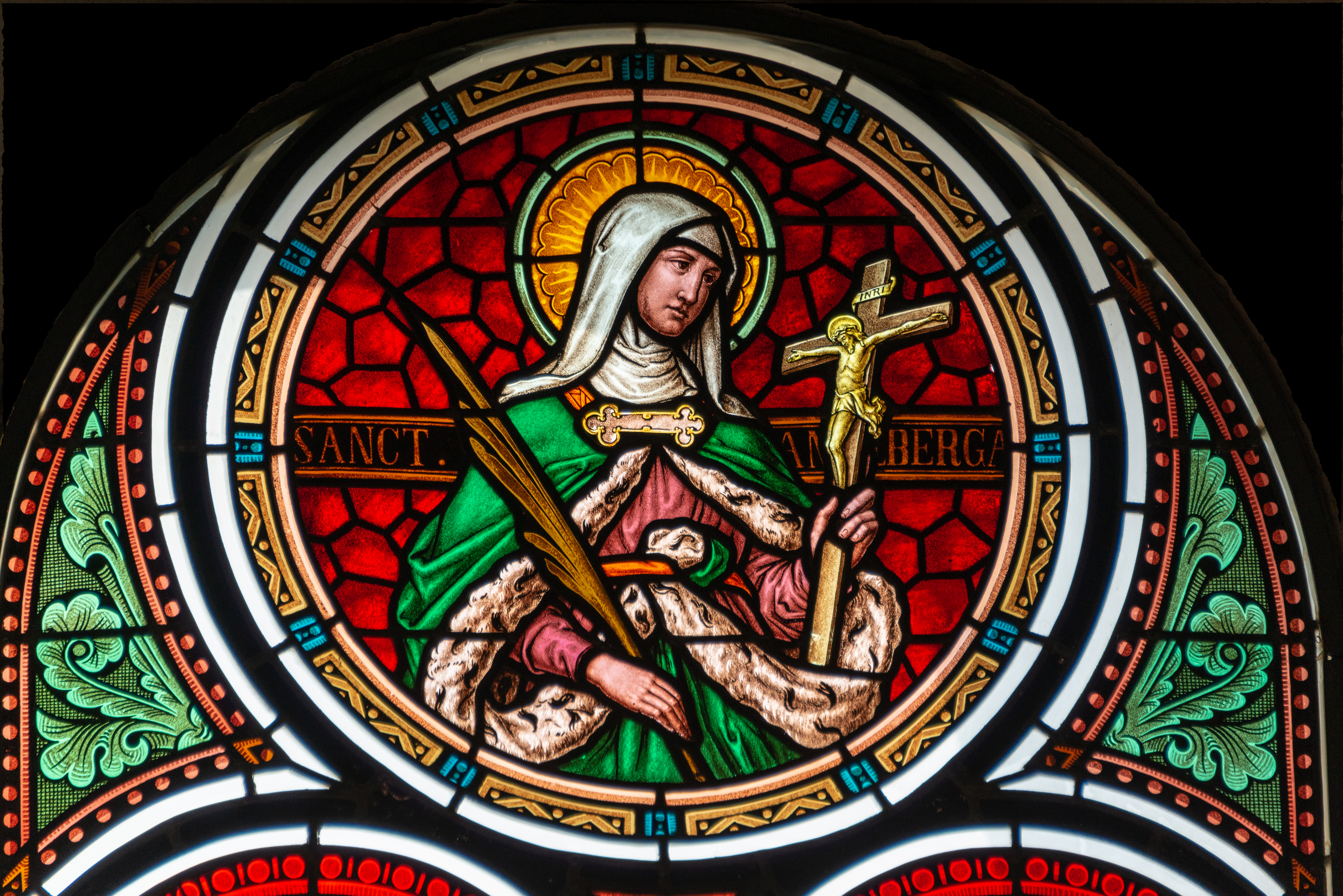 Fënsterausschnëtt an der Bech-Maacher Kierch.